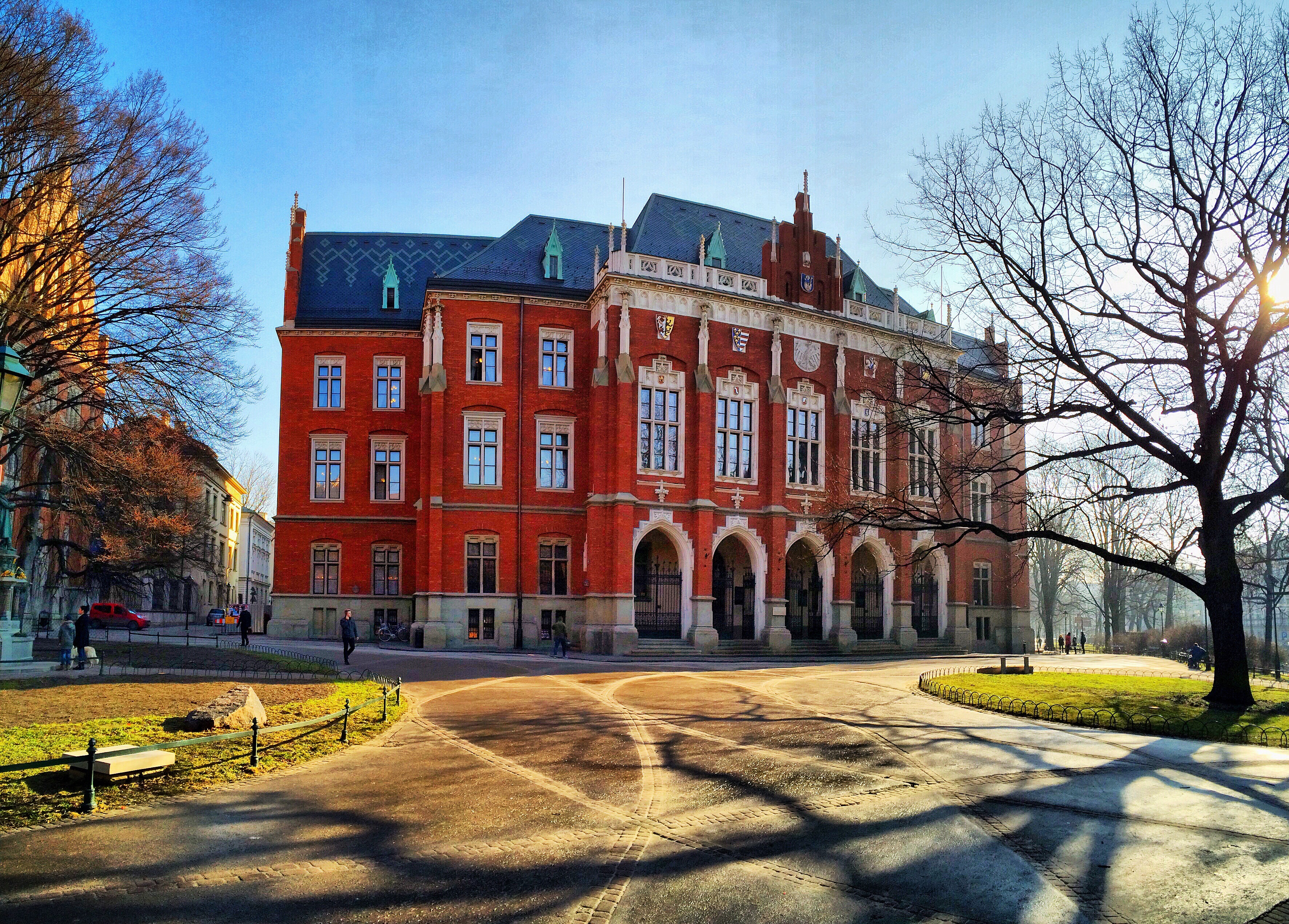 fot. Michał Adamus